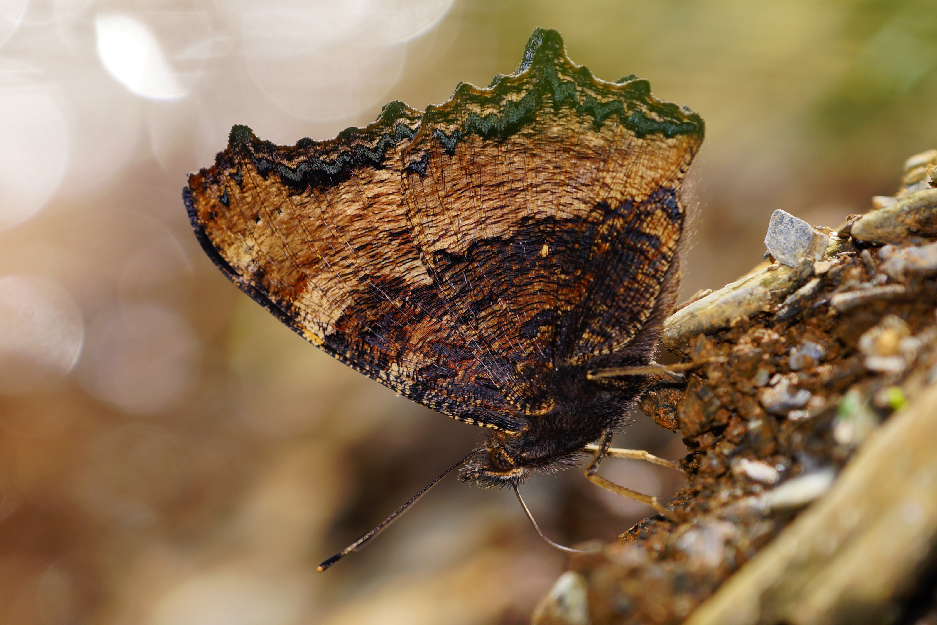 緋蛺蝶 Nymphalis xanthomelas formosana